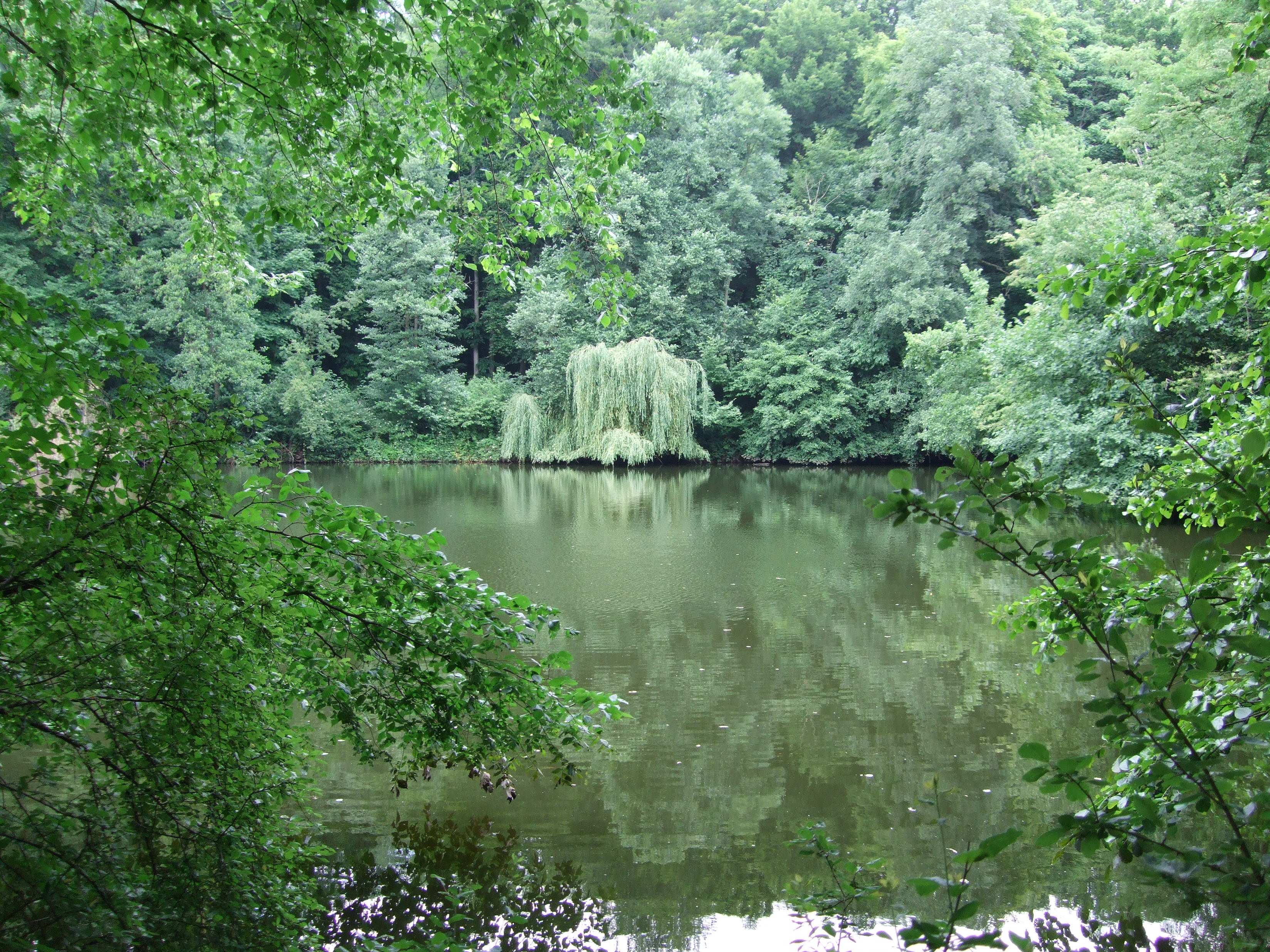 Jacobiweiher